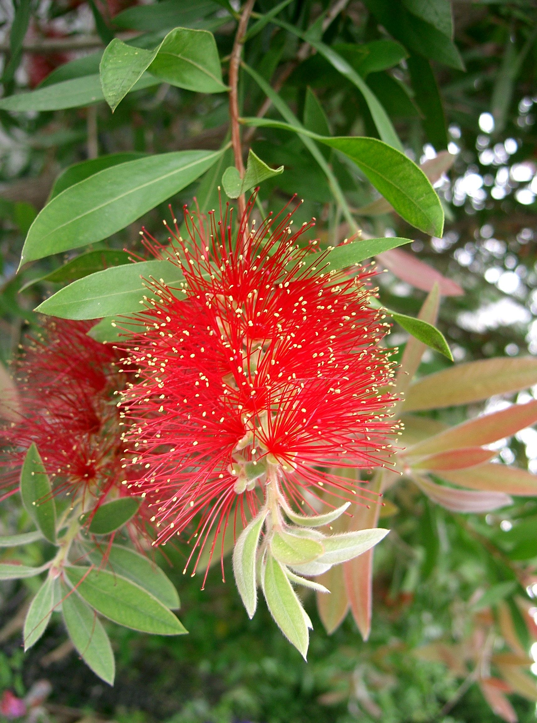 Callistemon speciosus Place:Osaka-fu Japan